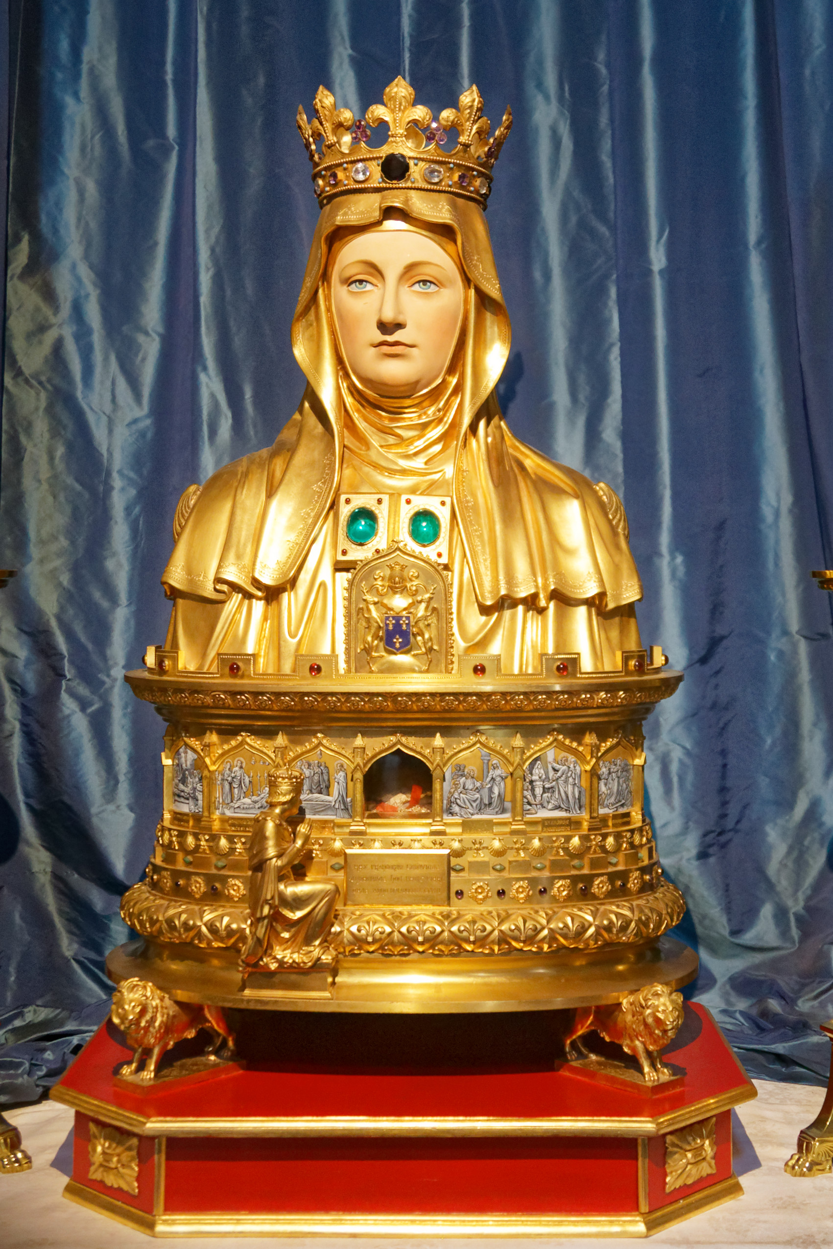 Église Sainte-Marthe in Tarascon, Reliquiar der heiligen Martha